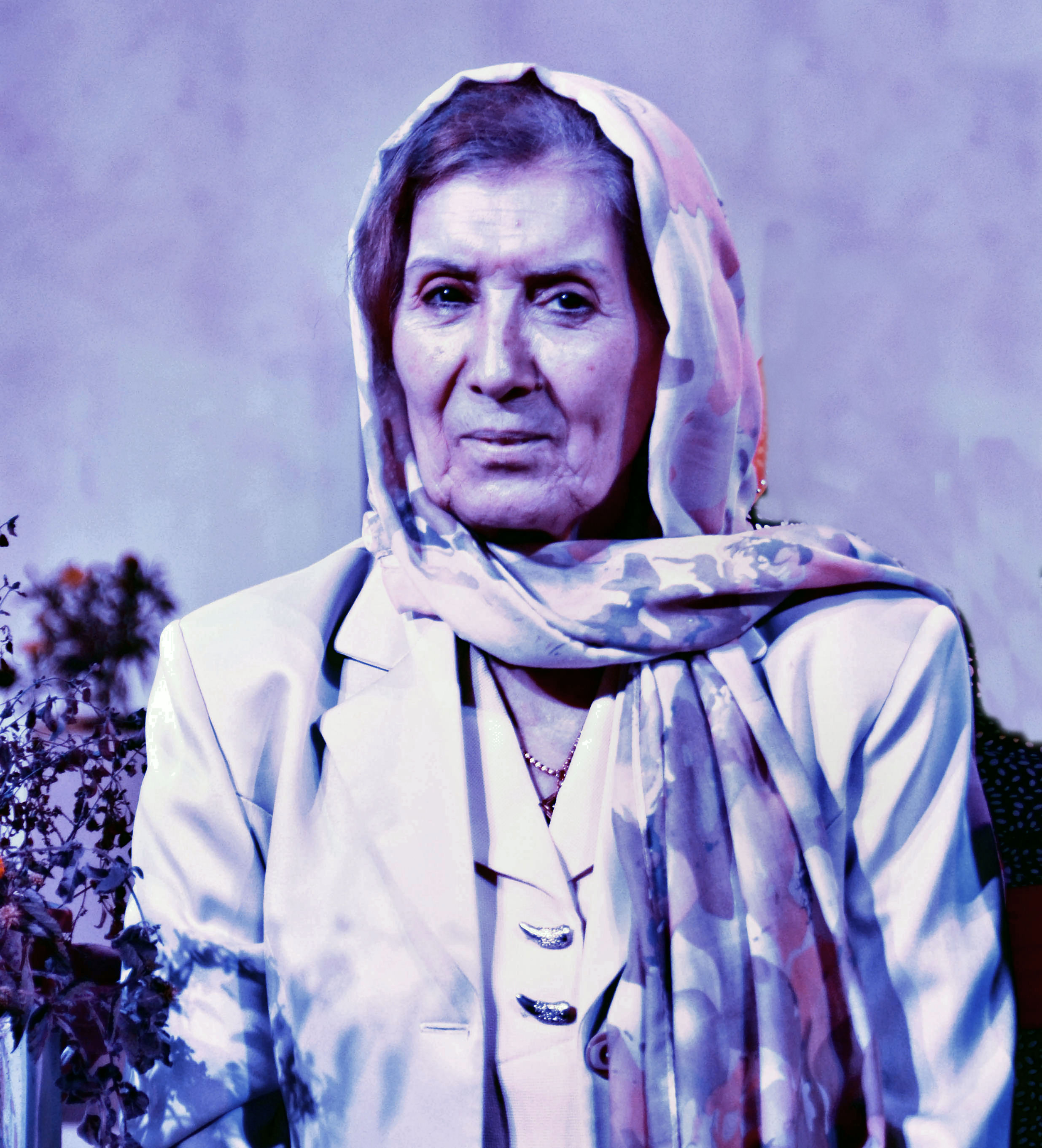 Madame Djamila BOUPACHA grande Moudjahida durant la guerre d’Algérie